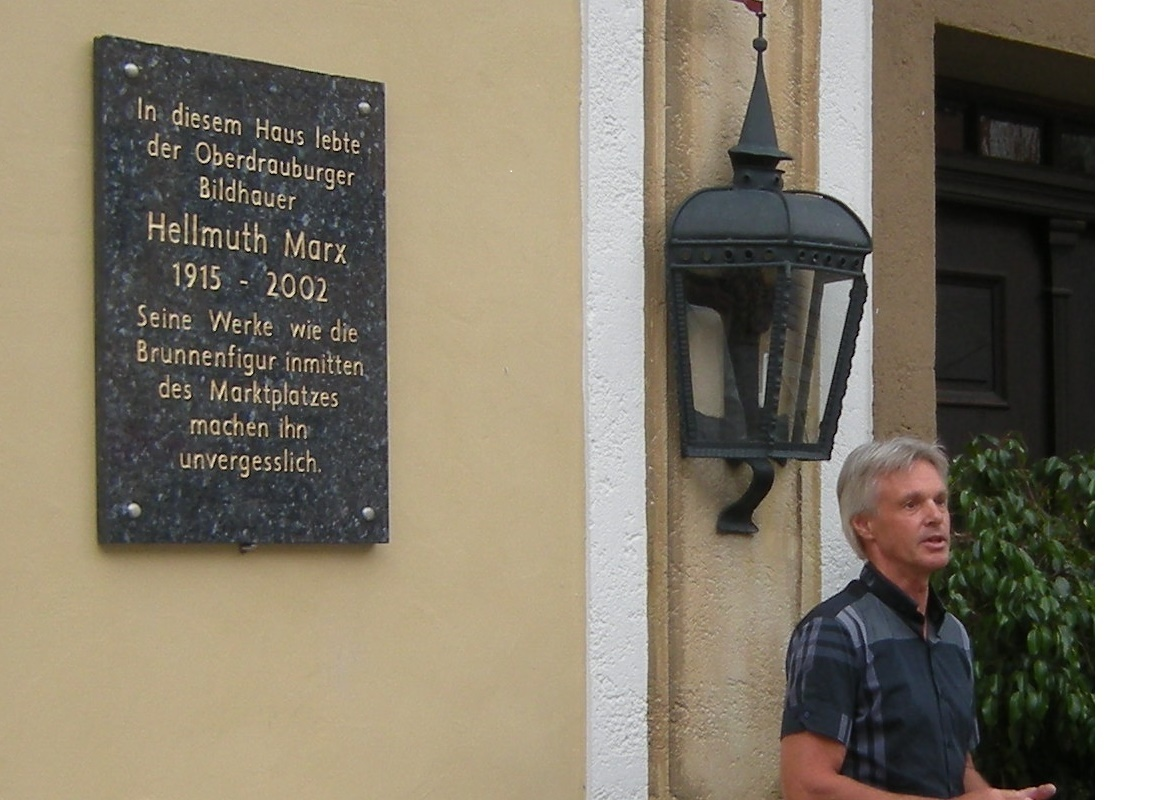 Magister civium Traburch castri magni aestimat et laudat artificem diem natalem centesimam agitantem gratiamque habet illae, quae tabulam reminiscendi largita est.